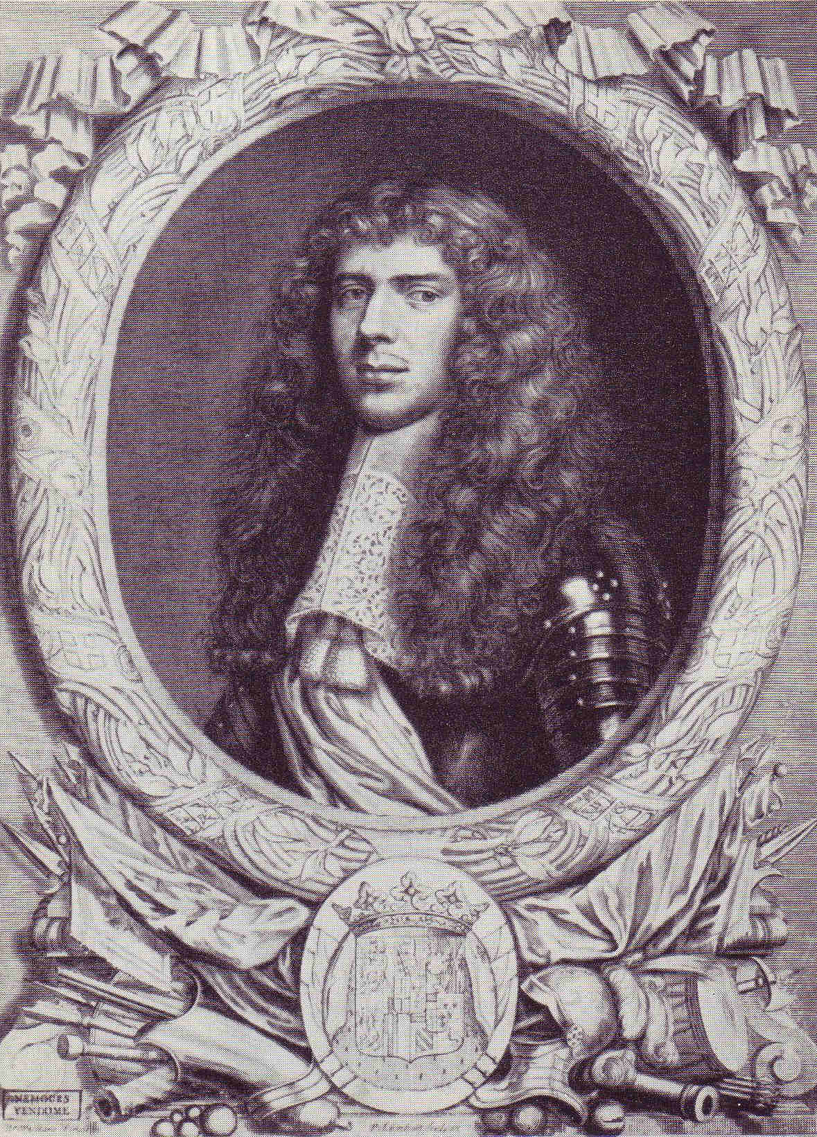 Stich von Eugen Moritz von Savoyen (1635–1673), französischer Offizier und der Vater von Prinz Eugen von Savoyen.